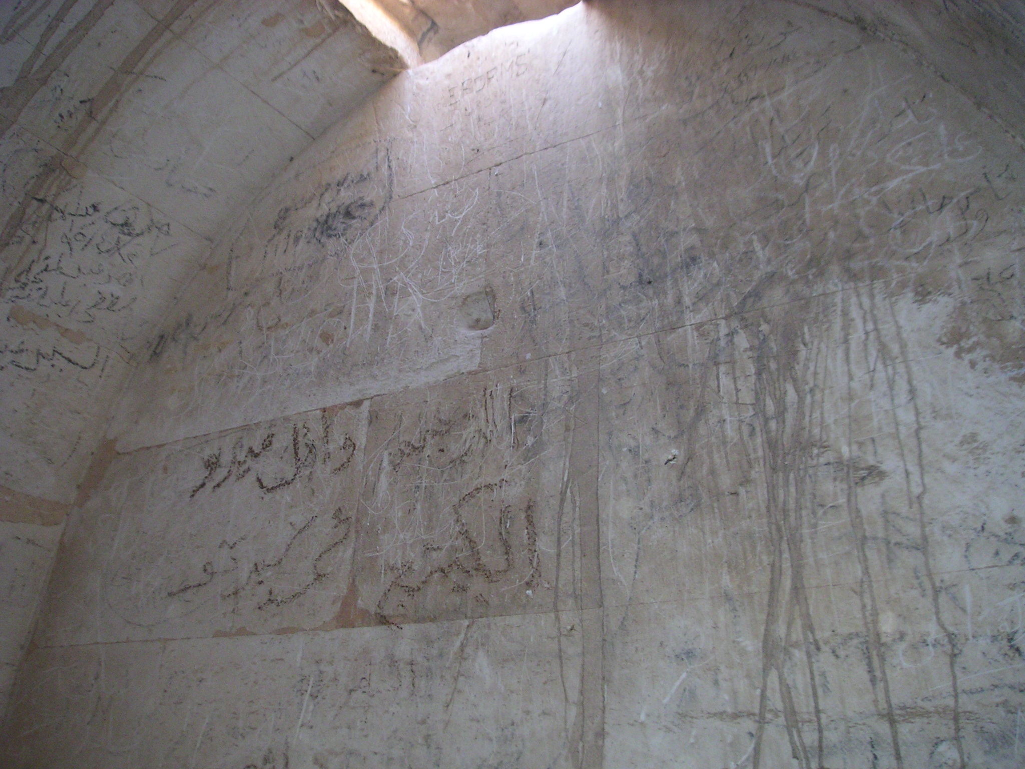 Vue d'une voûte d'un tombeau de la nécropole de Térénouthis - époque gréco-romaine - Kôm Abou Billou - novembre 2004